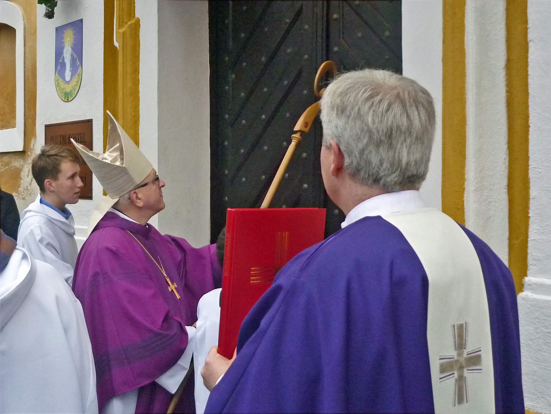 Öffnung der “Heiligen Pforte der Barmherzigkeit” in der Wallfahrtskirche Liebeschitz (Liběšice u Žatce) durch Bischof Jan Baxant am 20. Dezember 2015 (Heiliges Jahr 2015/16)